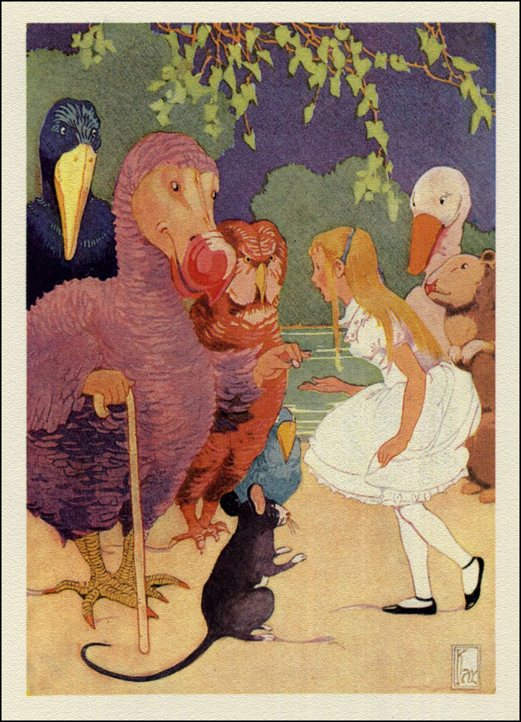 Иллюстрация к главе Бег по кругу книги Алиса в стране чудес